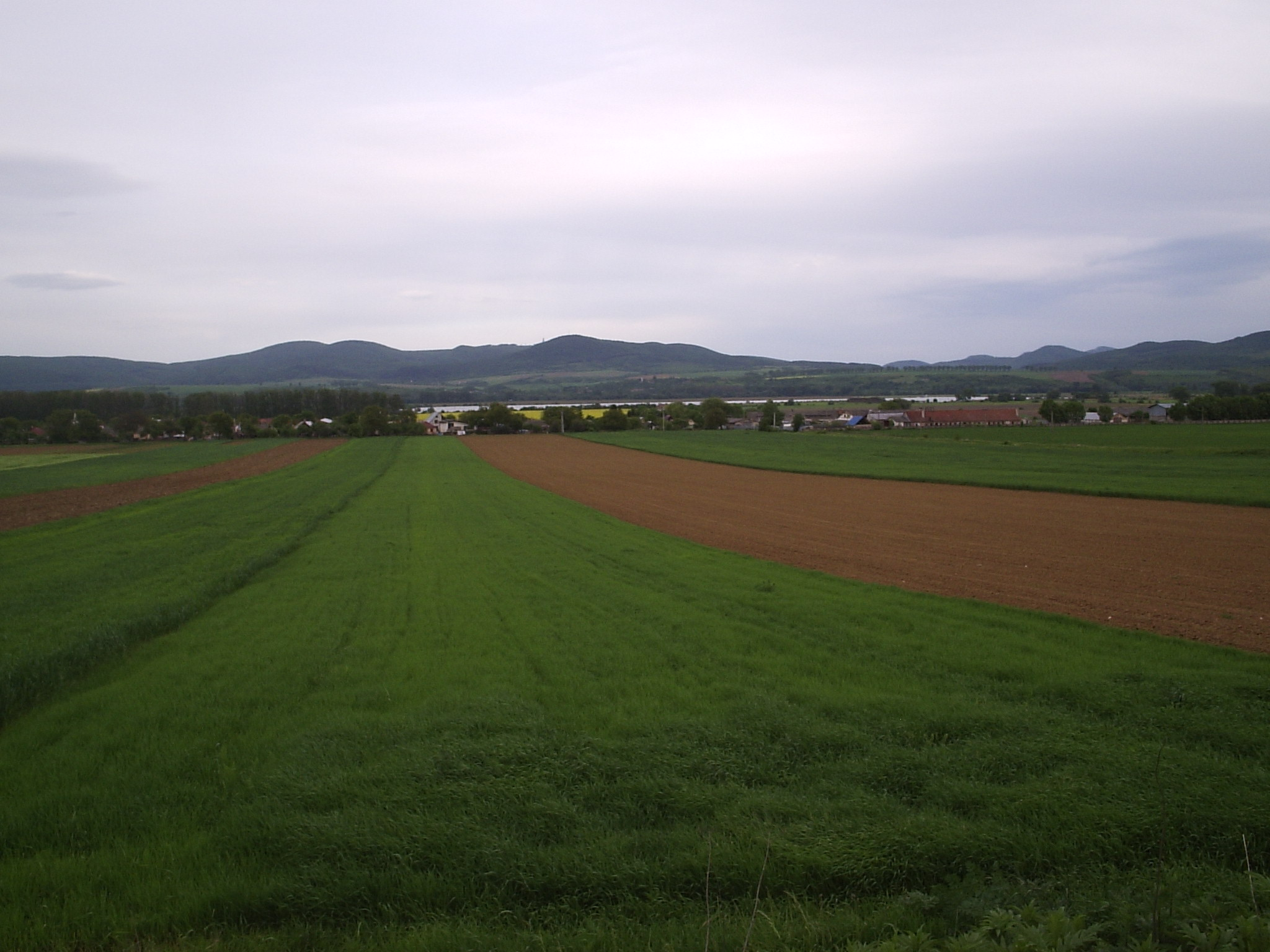 Jazero v obci Milhosť vzniknuté pri ťažbe štrku a piesku Licensing